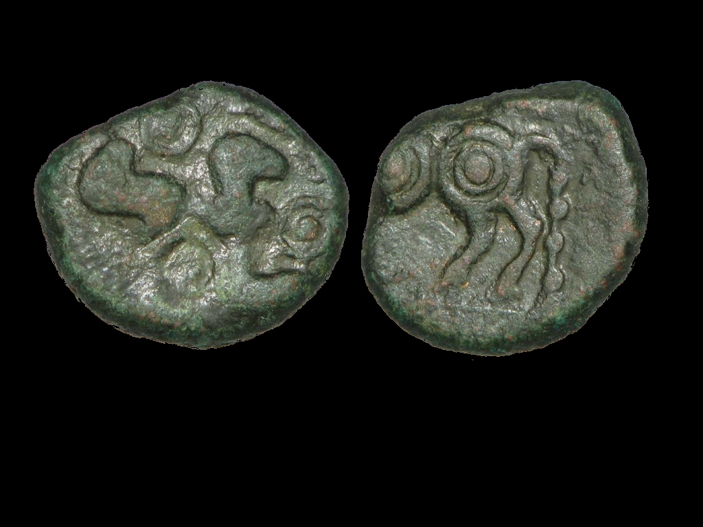 Monnaie de bronze de la tribus des Tongres. Extrème fin du 1er siècle avant J.C.